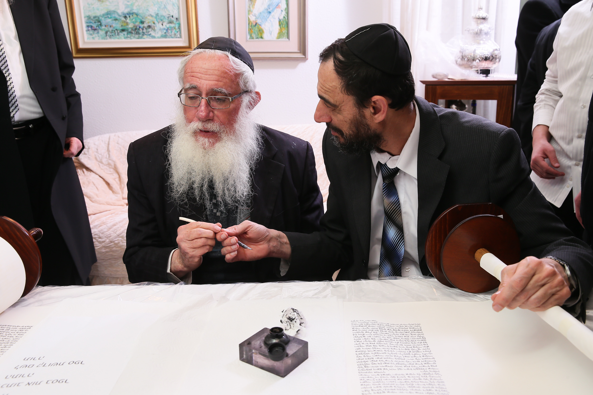 ישיבת מרכז הרב.